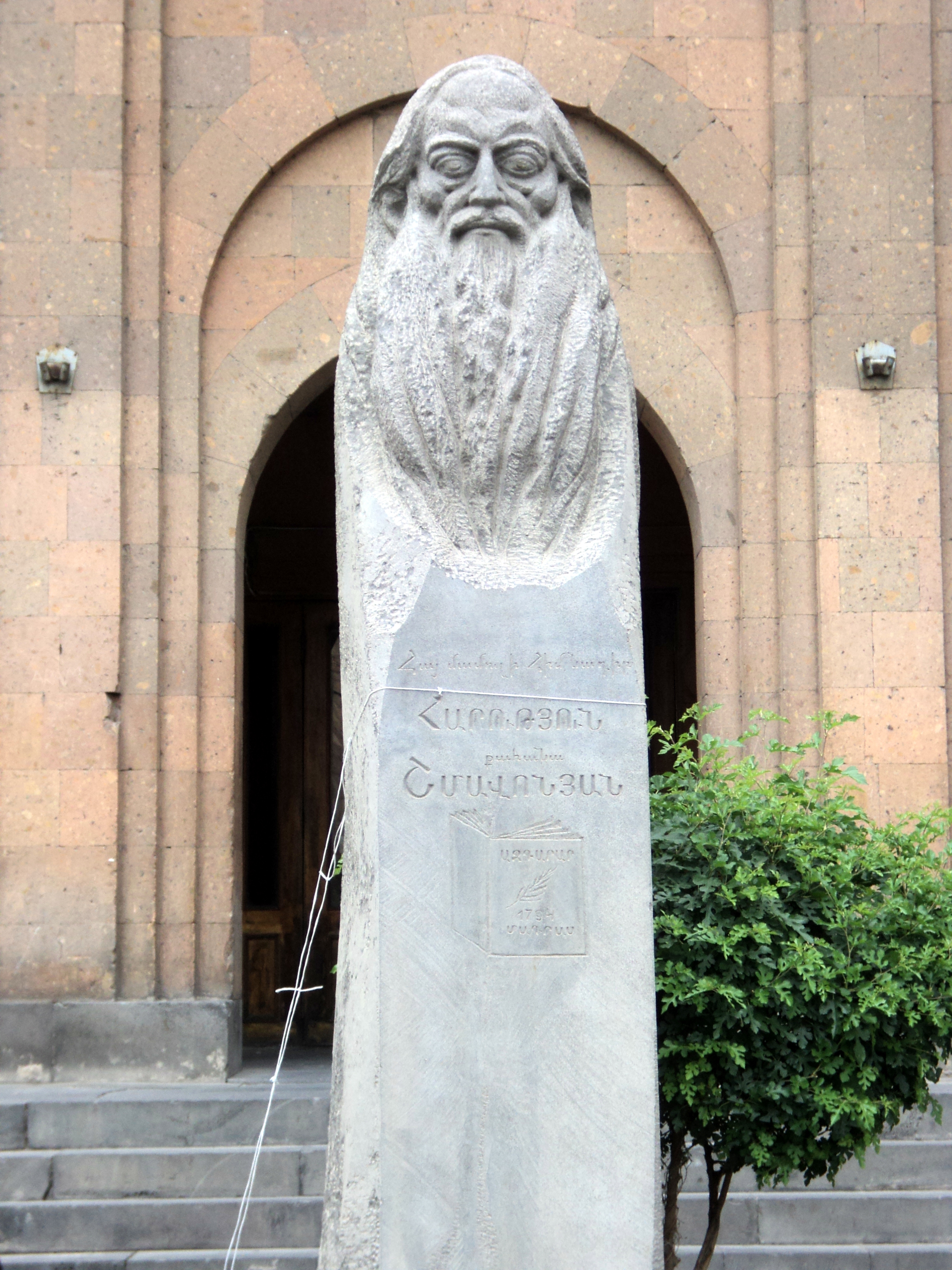 Հարություն Շմավոնյան